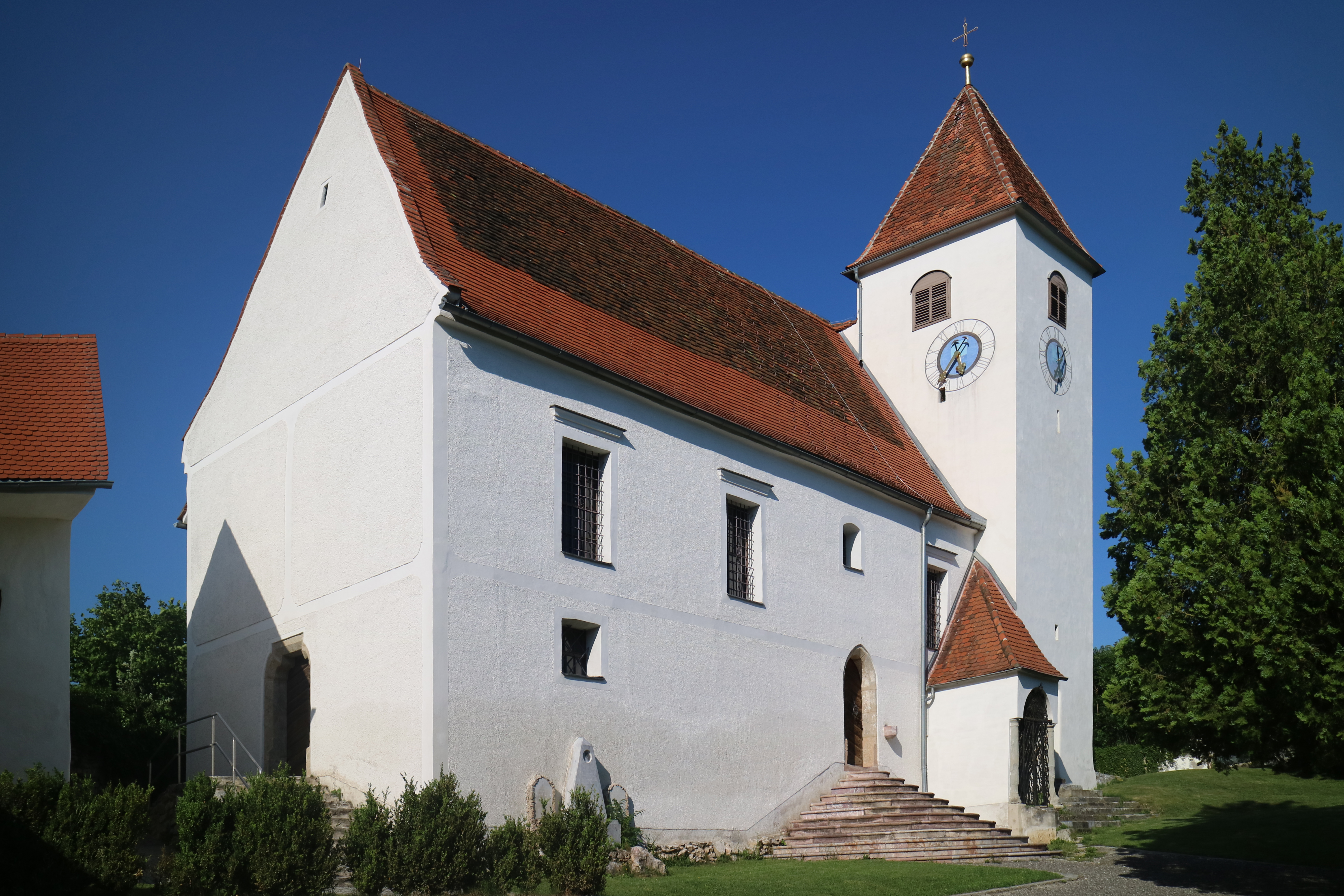 Pfarrkirche Deutschfeistritz, Gemeinde Deutschfeistritz (Steiermark)